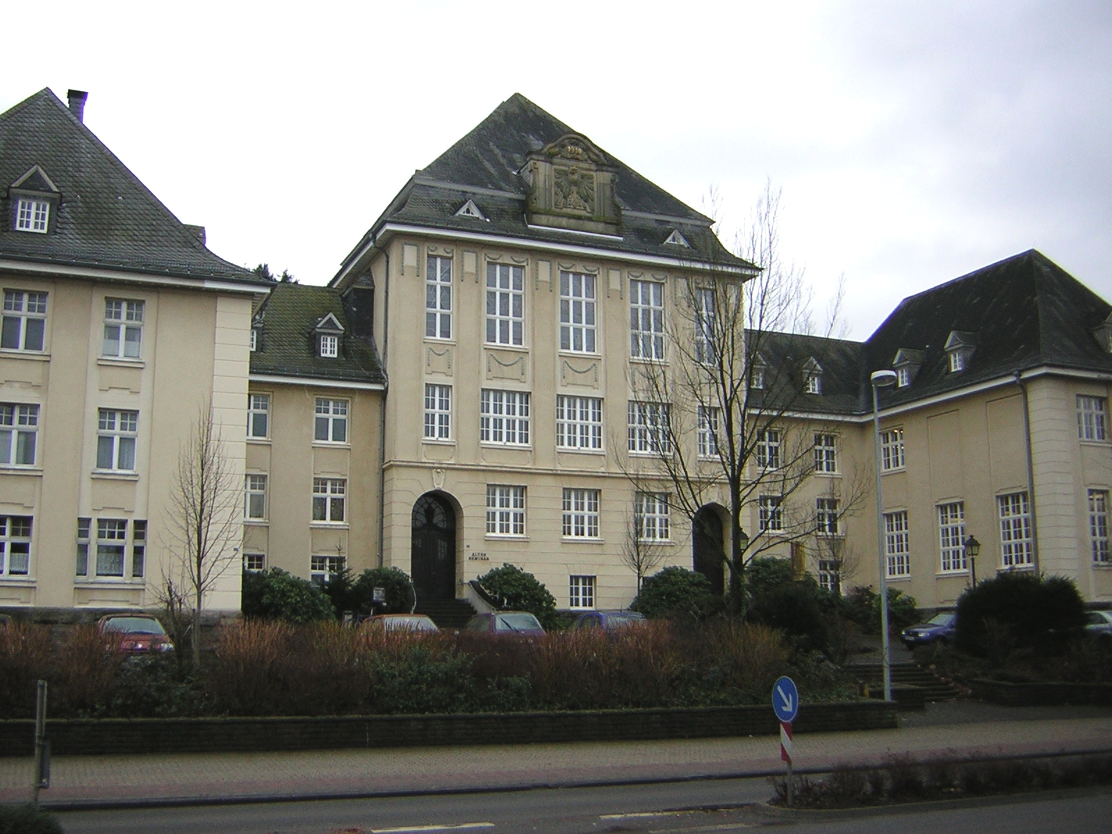 Beschreibung: Altes Seminar (altes Schulgebäude des Engelbert-von-Berg-Gymnasium Wipperfürth) in Wipperfürth Fotograf: Trexer Aufgenommen: 2005 mit Nikon Coolpix 2200